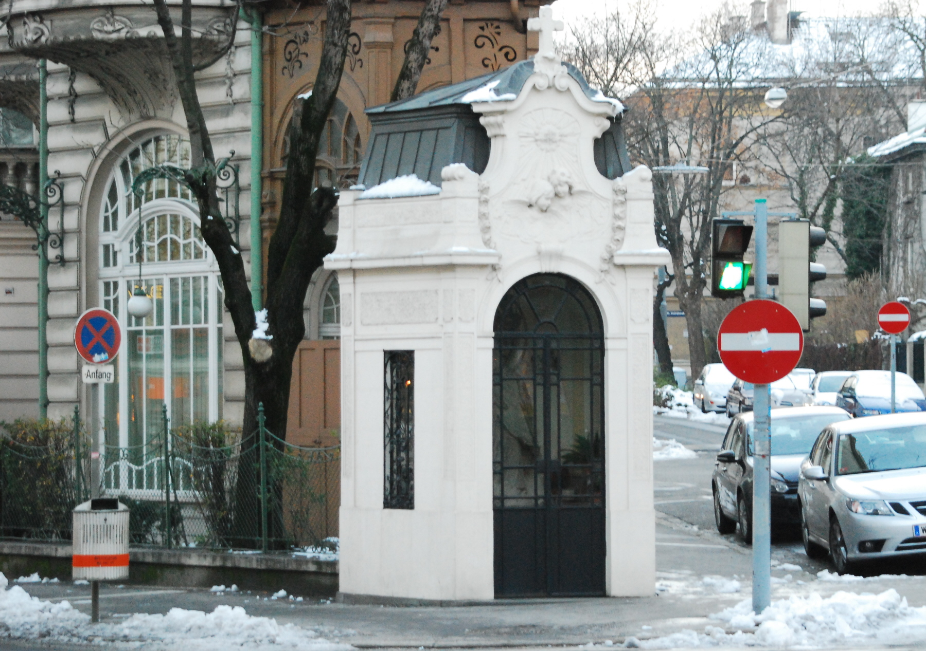 Johannes-Nepomuk-Kapelle in der Gersthofer Straße 65 in Wien-Währing